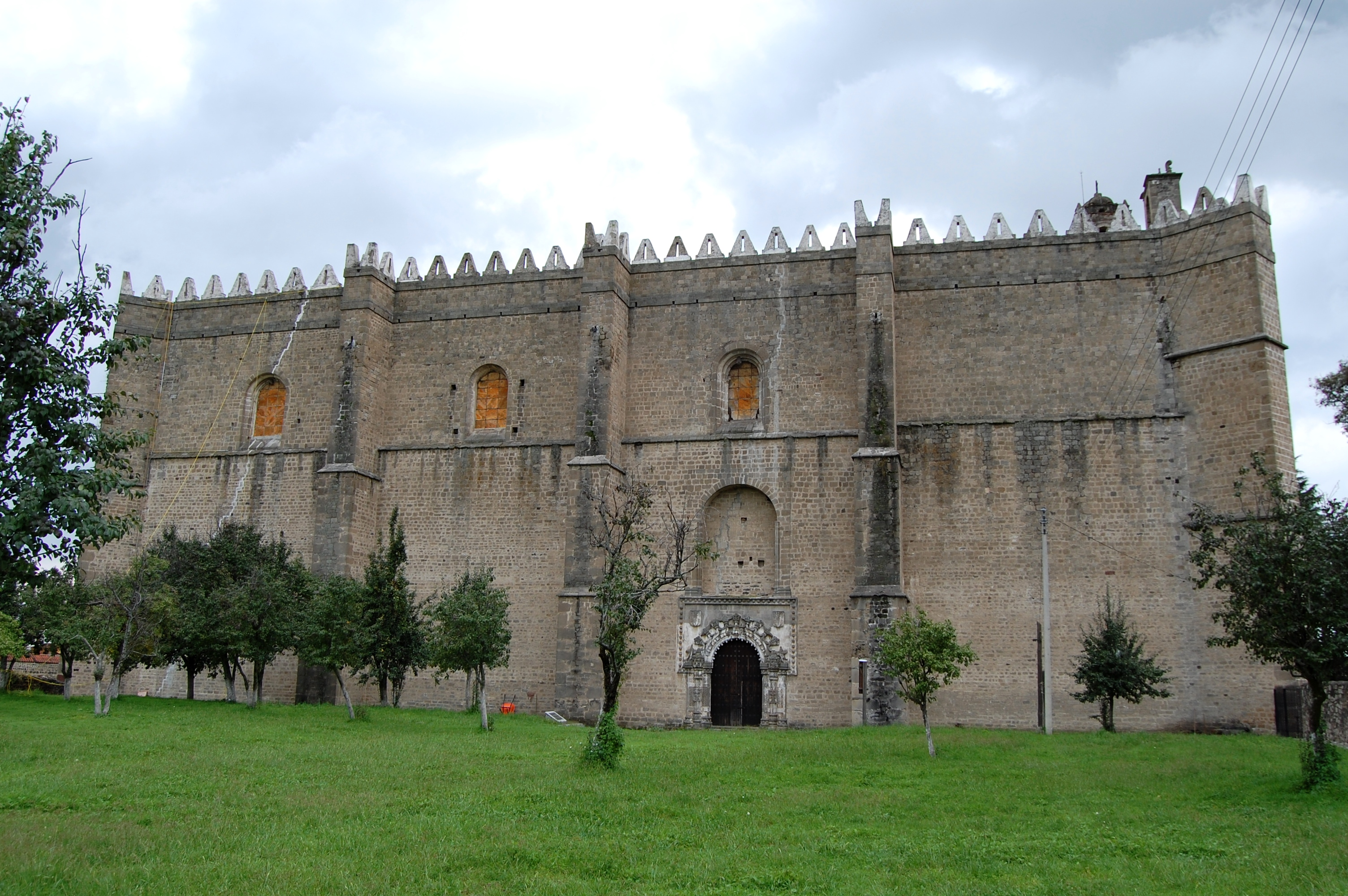 Convento de Huejotzingo, estado de Puebla (México). Vista lateral de la iglesia, con la Puerta de la Porciúncula. Siglo XVI.